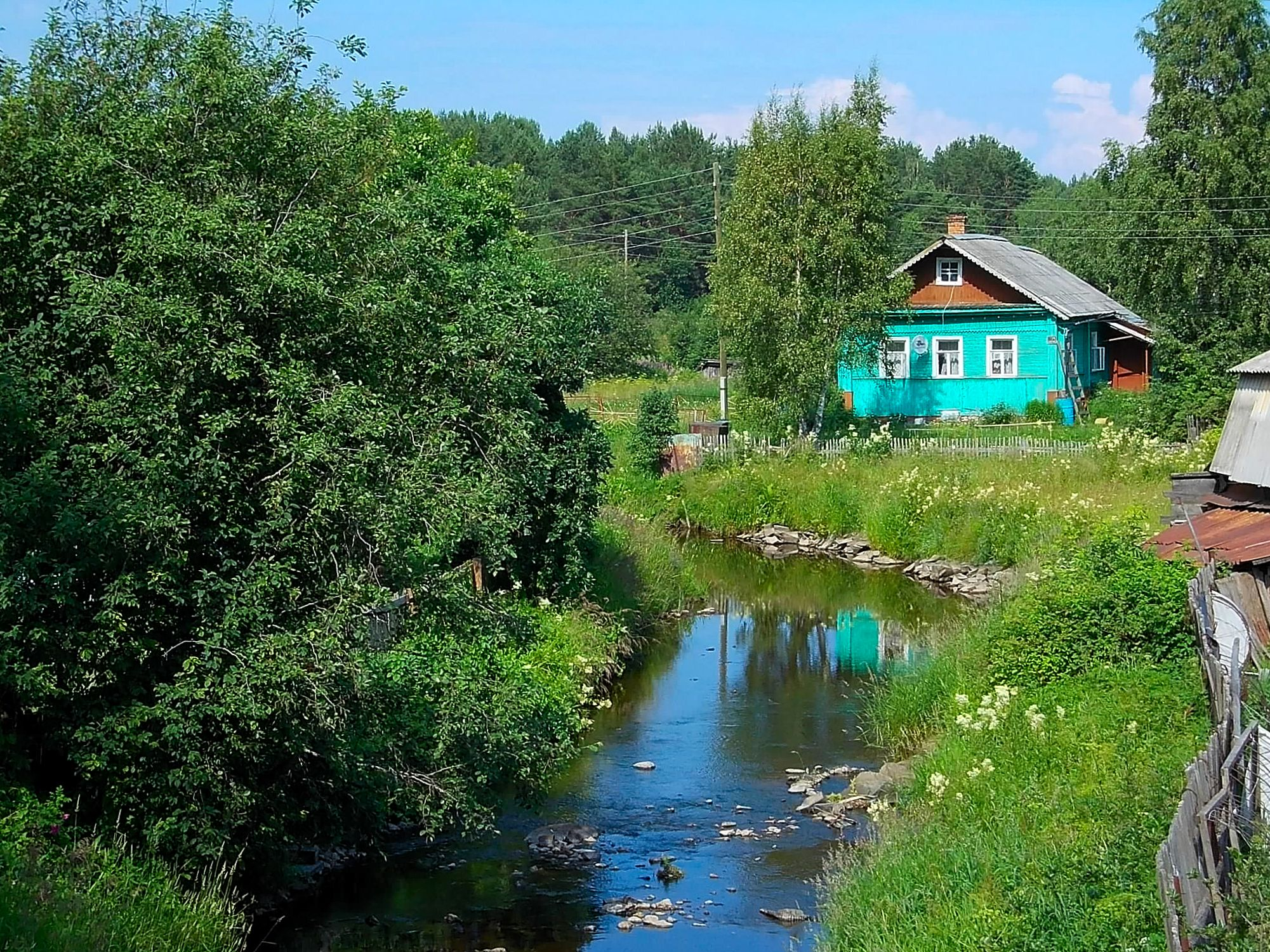 Река Деревянка